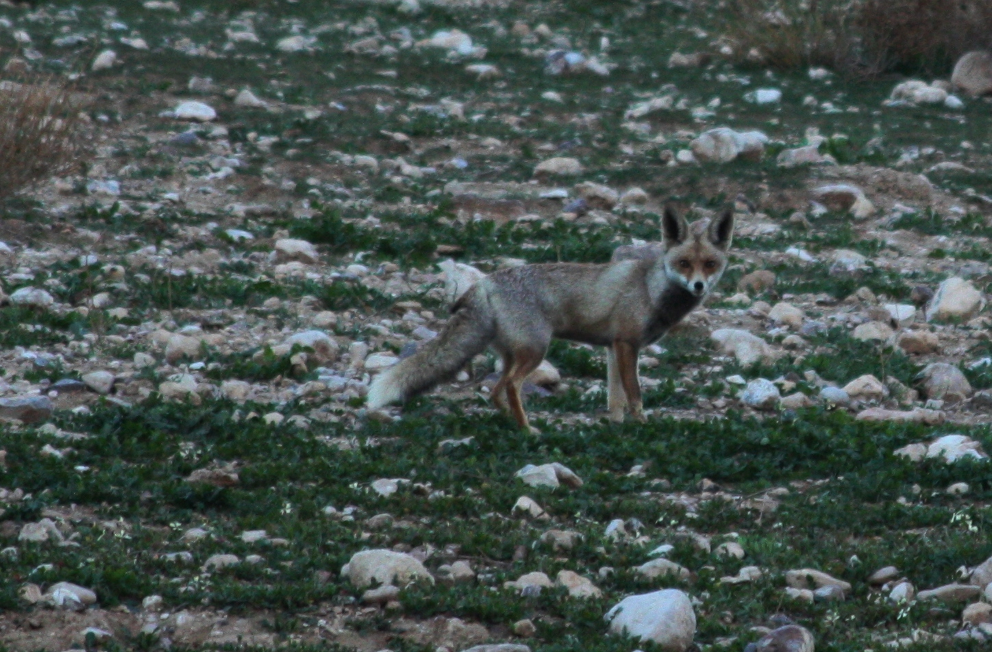 Arabian Red Fox picture taken in Al Sukhnah, Jordan